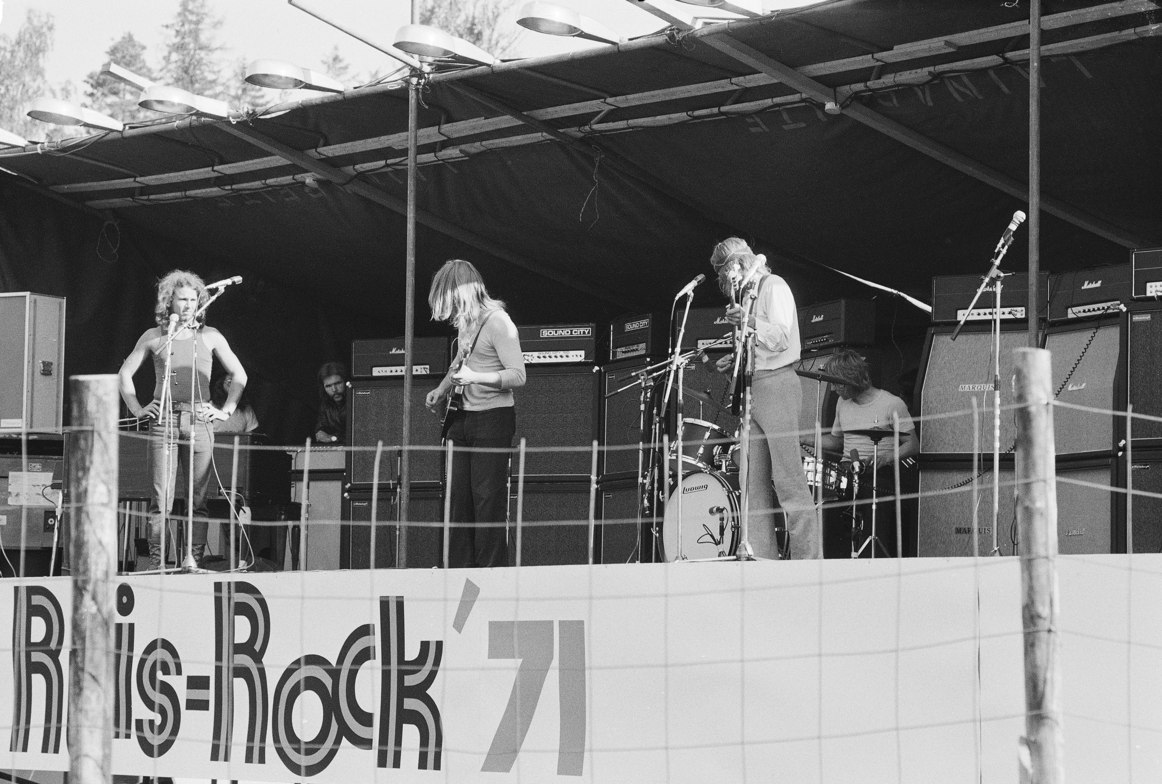 Faction-yhtye Ruisrockissa, Turun Rockfestivaali 20.-22.8.1971, Ruissalo, Turku, 21.8.1971